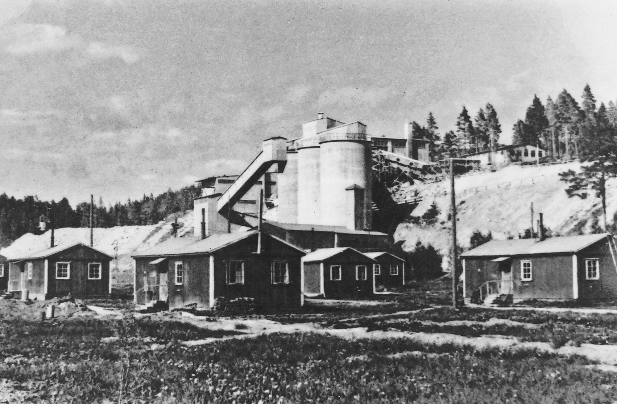 Stora Vika cementfabrik under uppförande med barackstaden